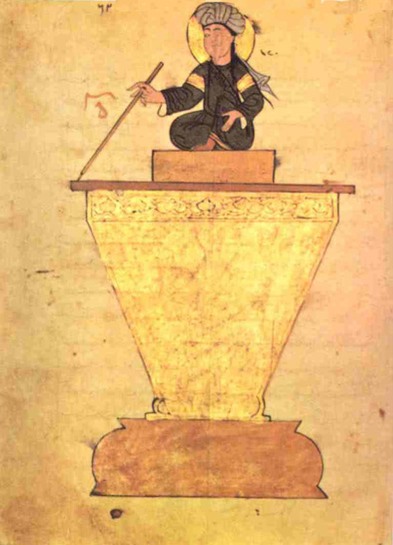 Extérieur de l'horloge hydraulique du Scribe.